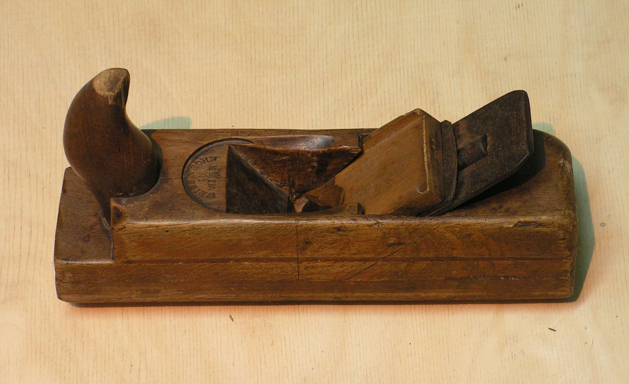 Strug - gładzik.